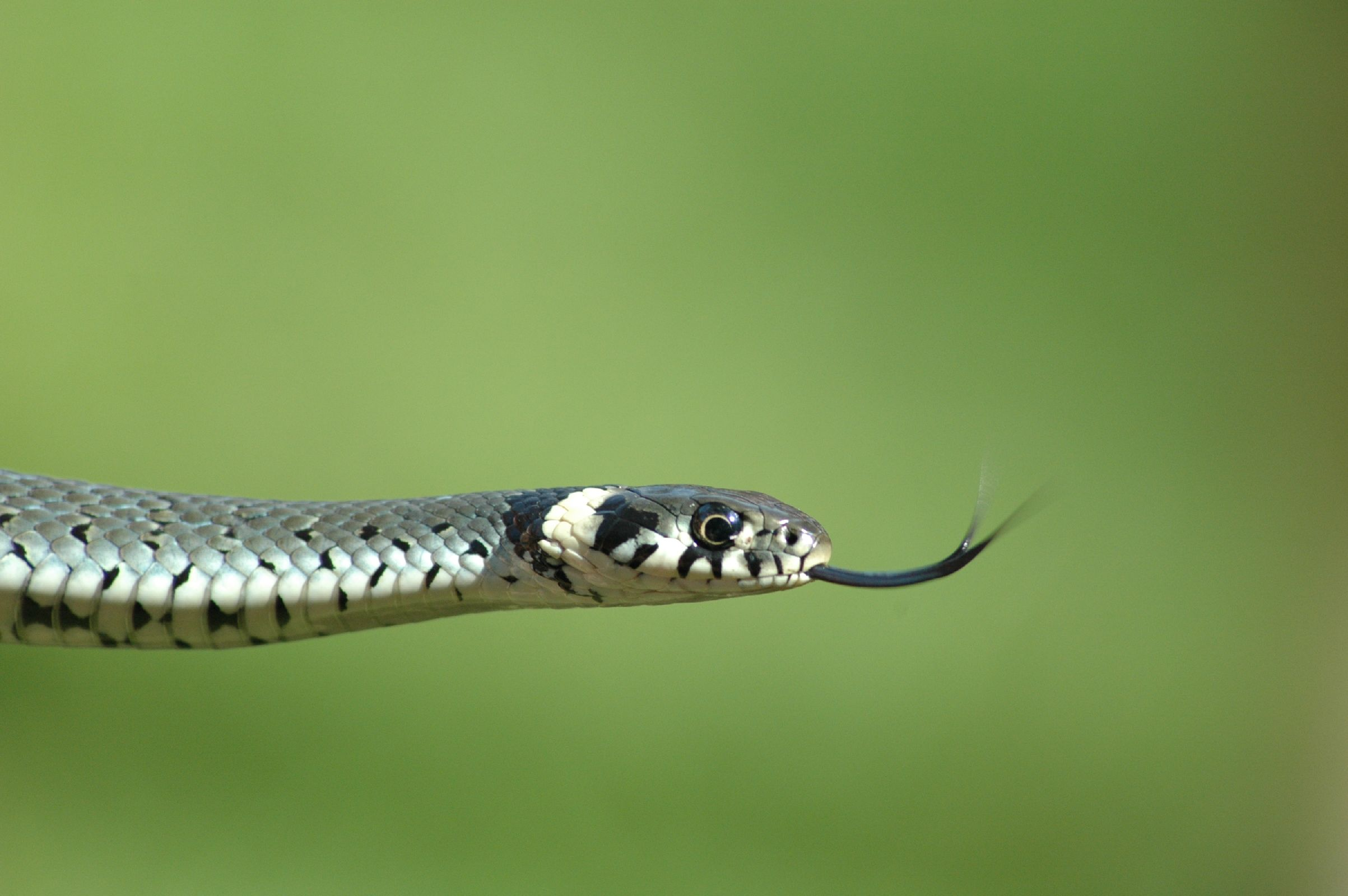 Ringelnatter beim züngeln